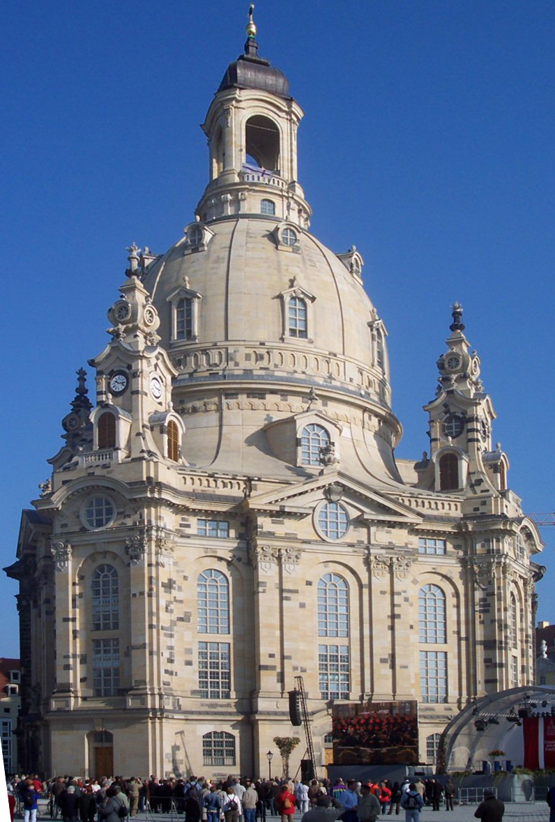 Die Dresdener Frauenkirche am Tag nach der Weihe. Es findet gerade die Festveranstaltung zum Reformationstag statt, die das Fernsehen auf Großleinwand überträgt.